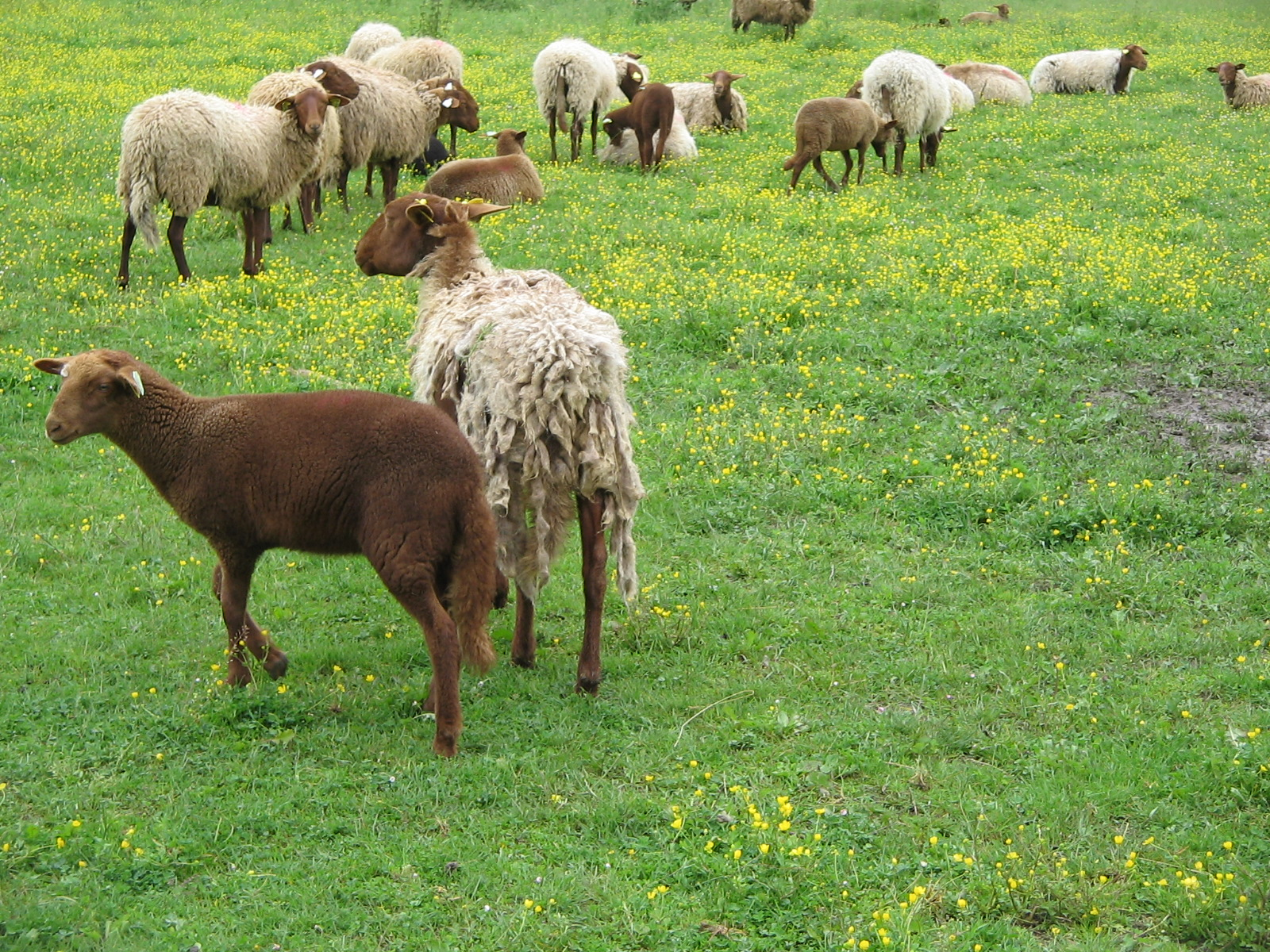 Agneaux et brebis solognotes à Pleumartin (86) en juin 2010